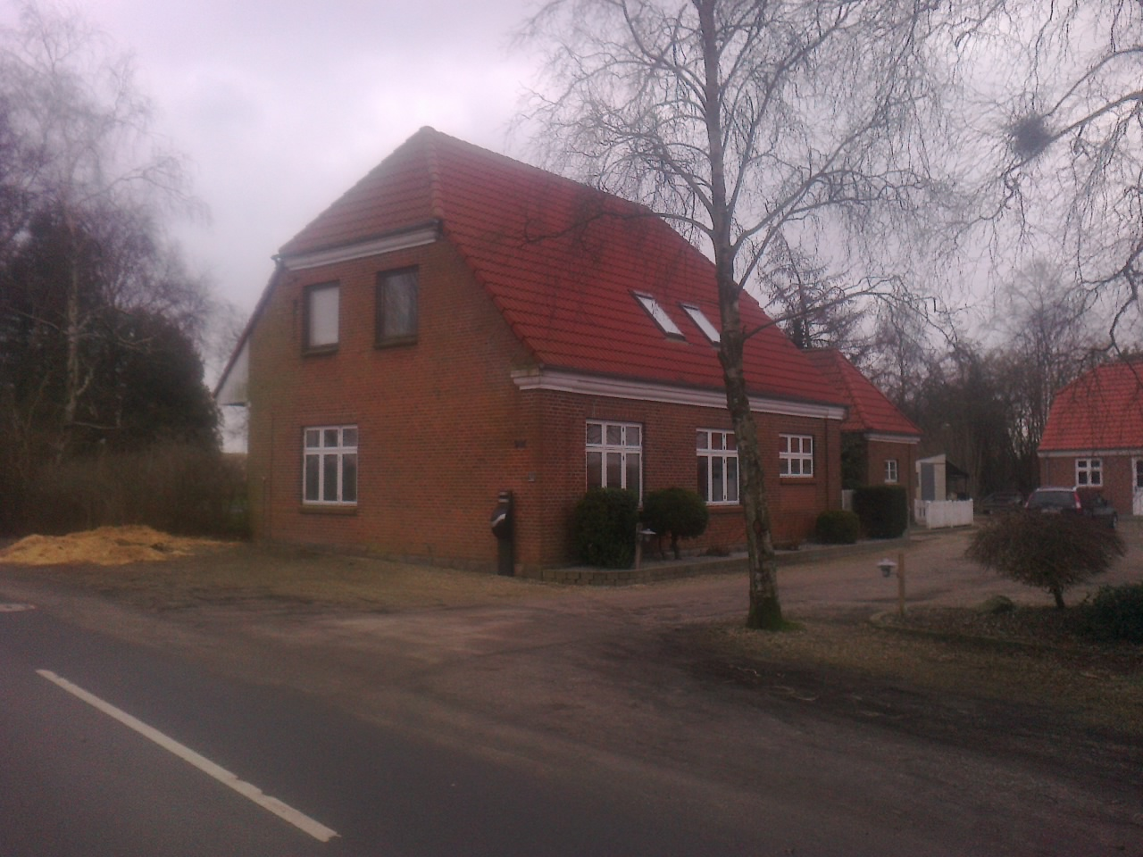 Sall station på den nedlagte Hammelbane